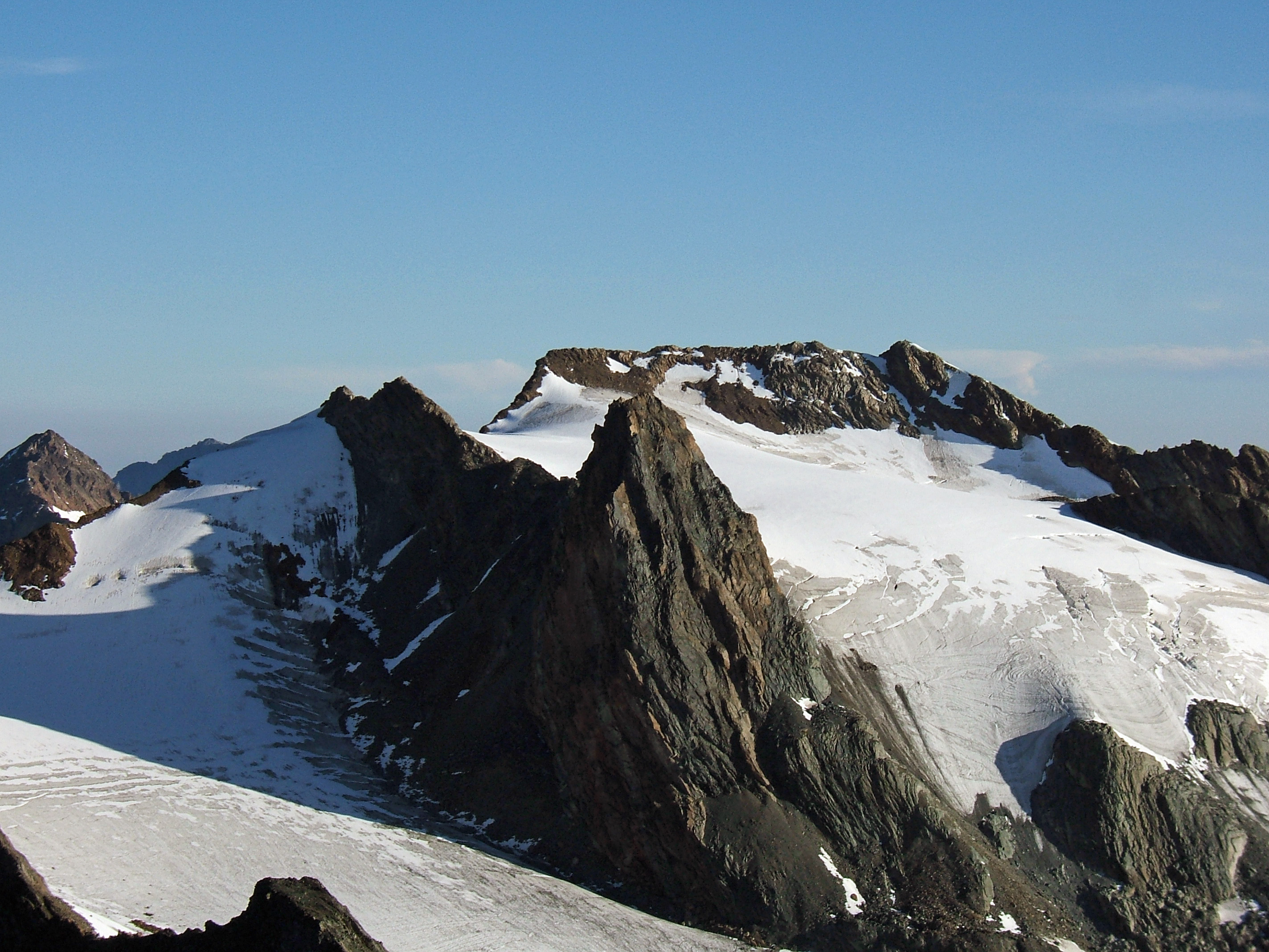 Hochvernagtspitze von Süden, vom Fluchtkogel